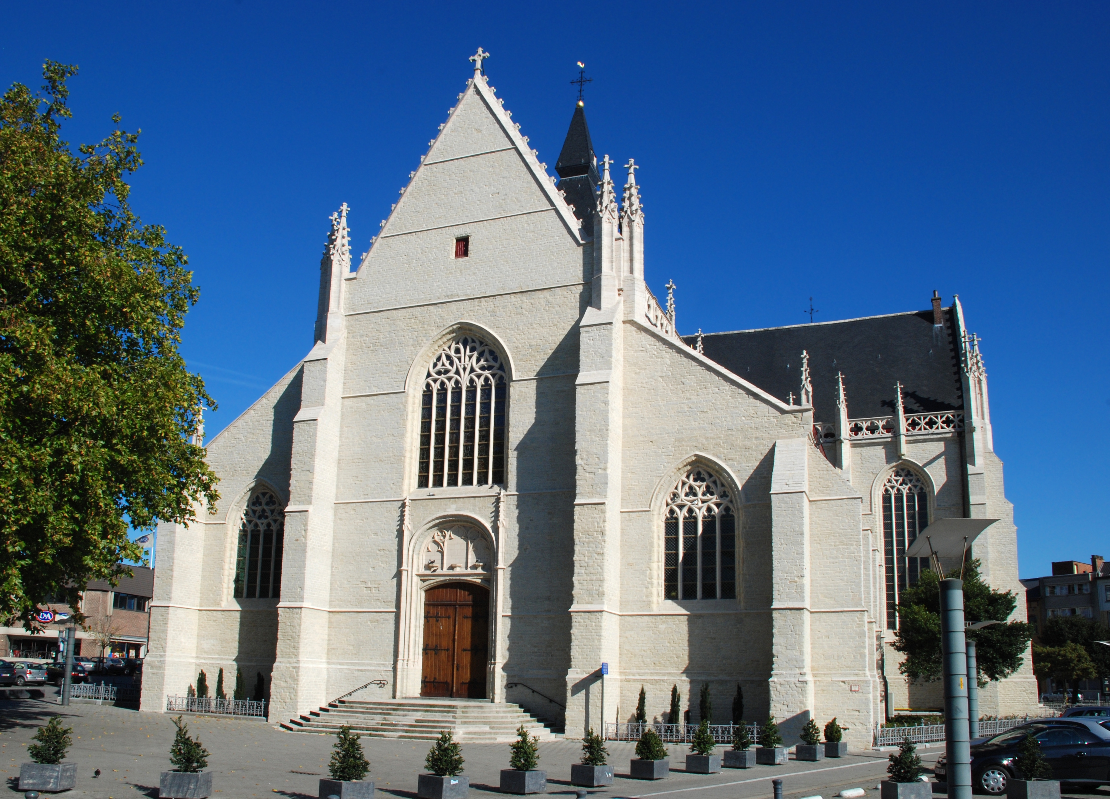 Belgique - Brabant flamand - Vilvorde - Église Notre-Dame de Bonne-Espérance